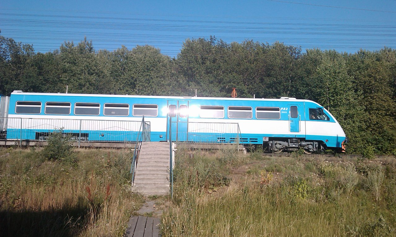 Головной вагон дизель-поезда РА2 на Разъезде 275 км